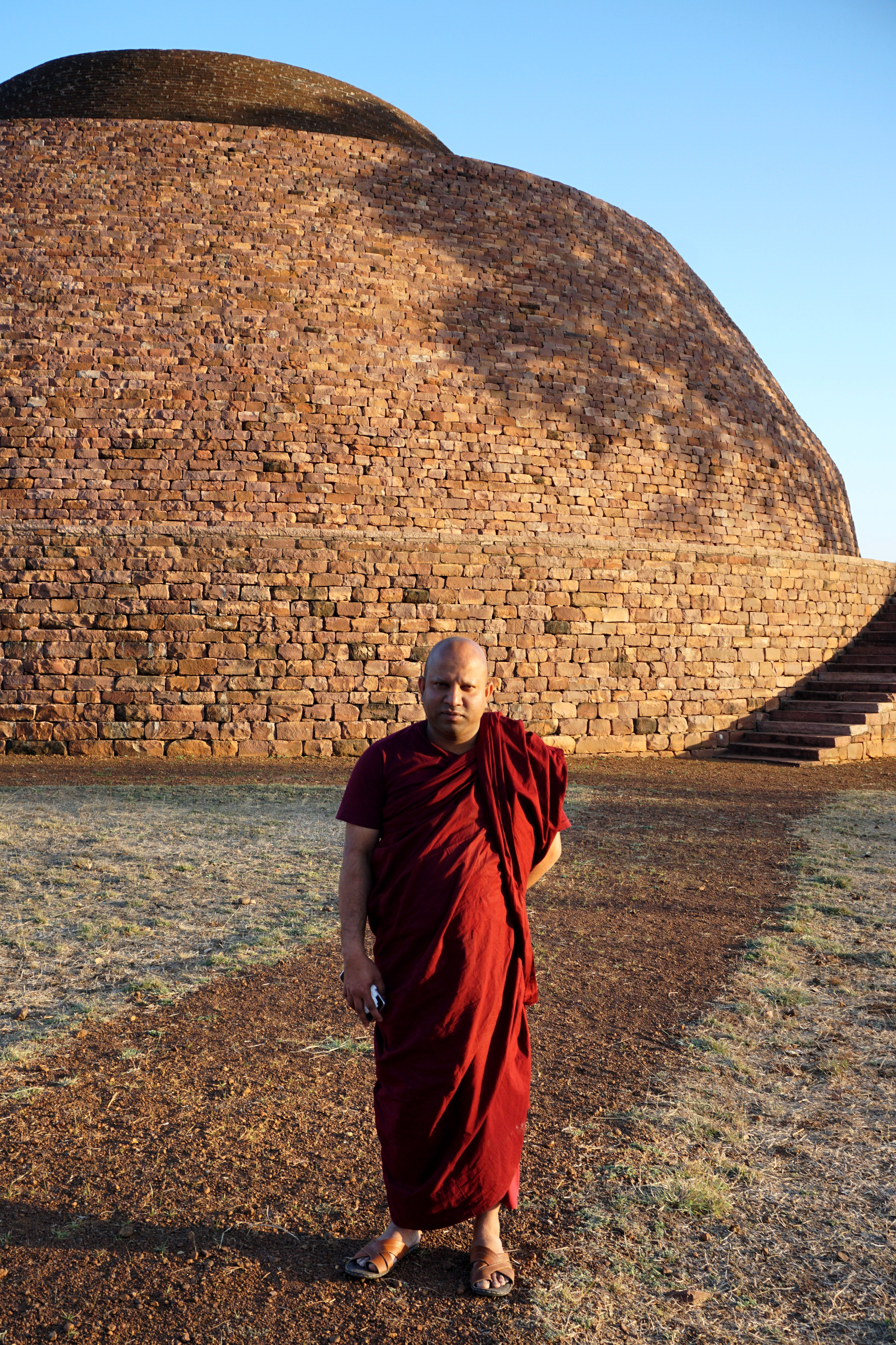 Satdhara Stupa Site, Vidisha, India